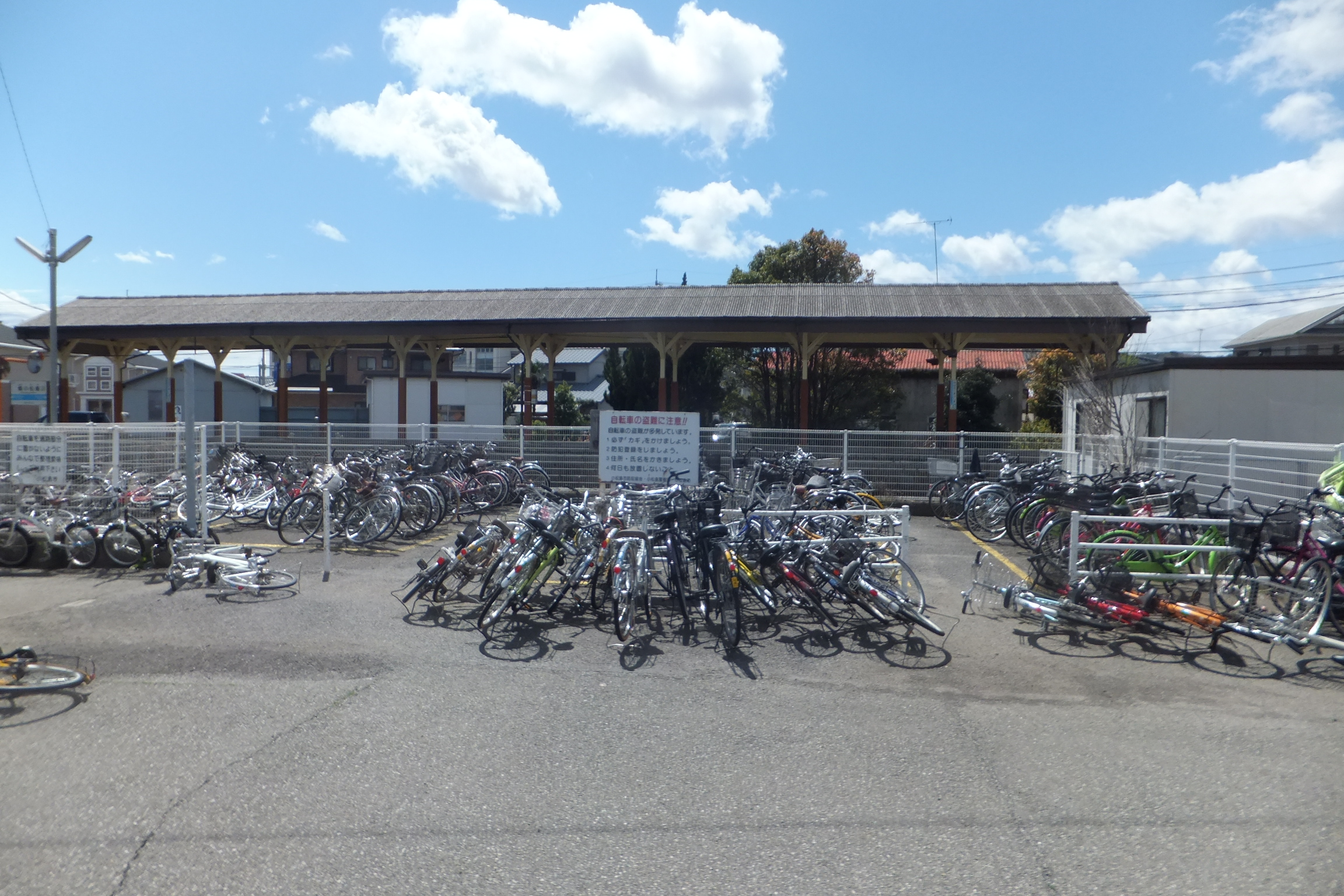 南小松島駅（2014年4月9日）